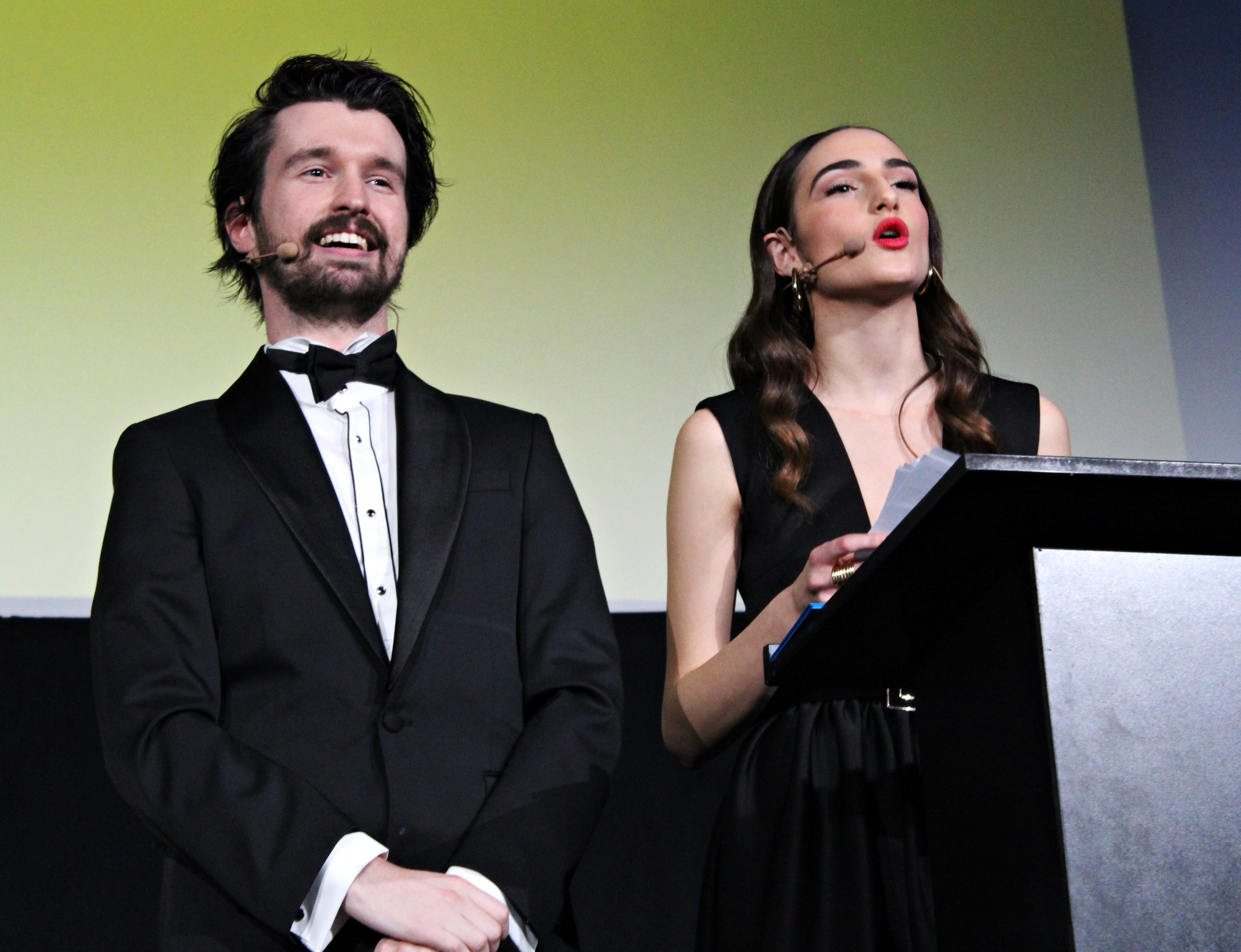 Los actores españoles Santiago Alverú y Sandra Escacena presentando la ceremonia de entrega de las Medallas del Círculo de Escritores Cinematográficos de 2018.